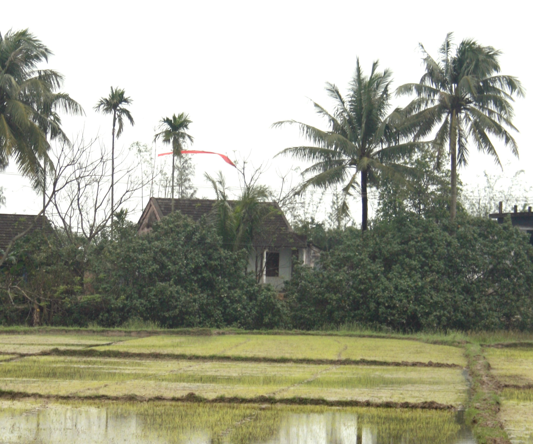 Ảnh do người truyền lên chụp